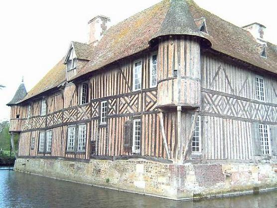 Manoir de Coupesarte (Calvados, France) - XVIe Photo by Cicero, april 2004